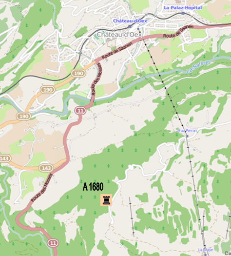 Artilleriewerk La Braye, Château-d’Œx VD, Schweiz